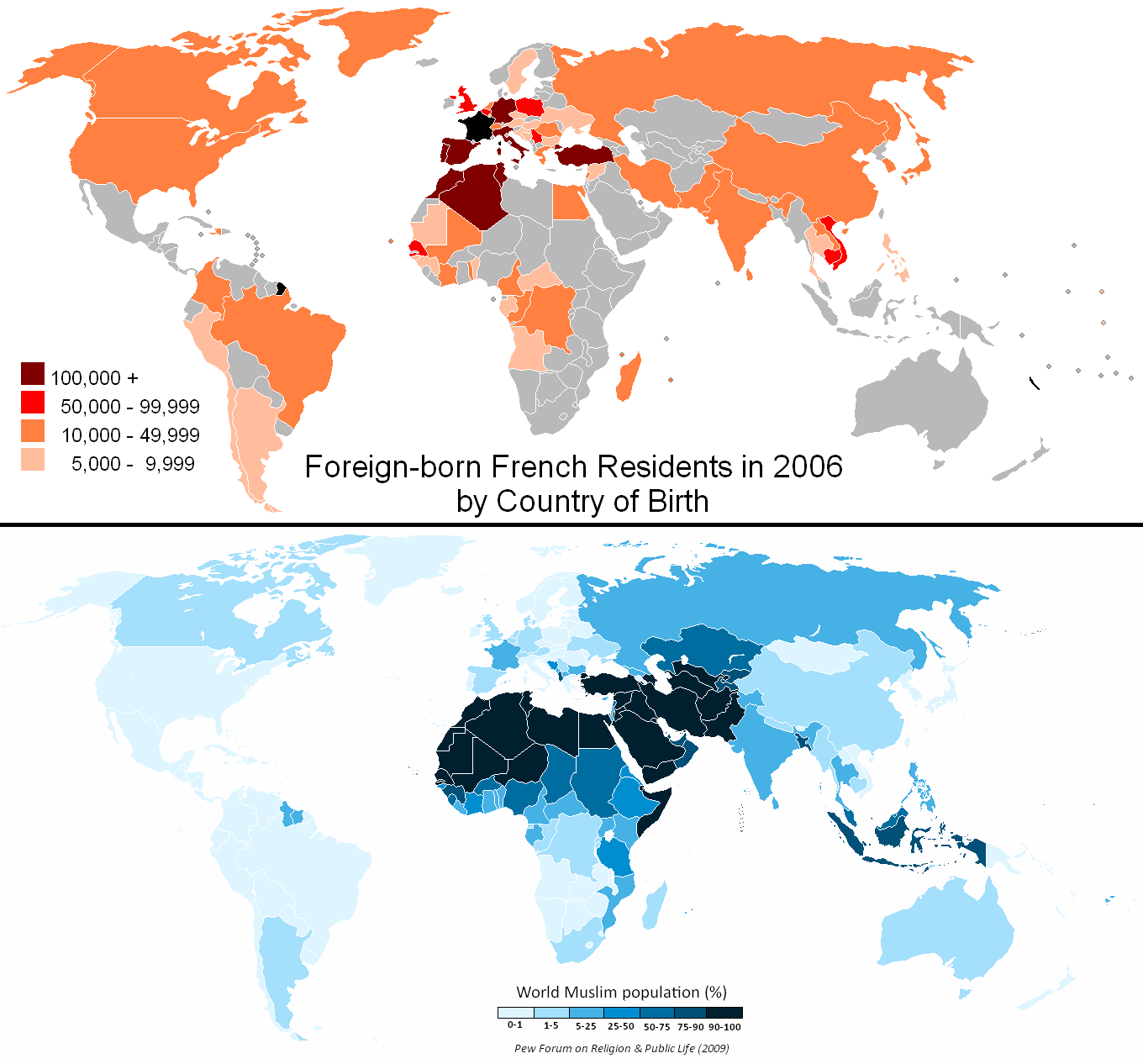 Pays de naissance des personnes résidant en France en 1999 et qui sont étrangères ou ont été naturalisées françaises et la population musulmane du monde.